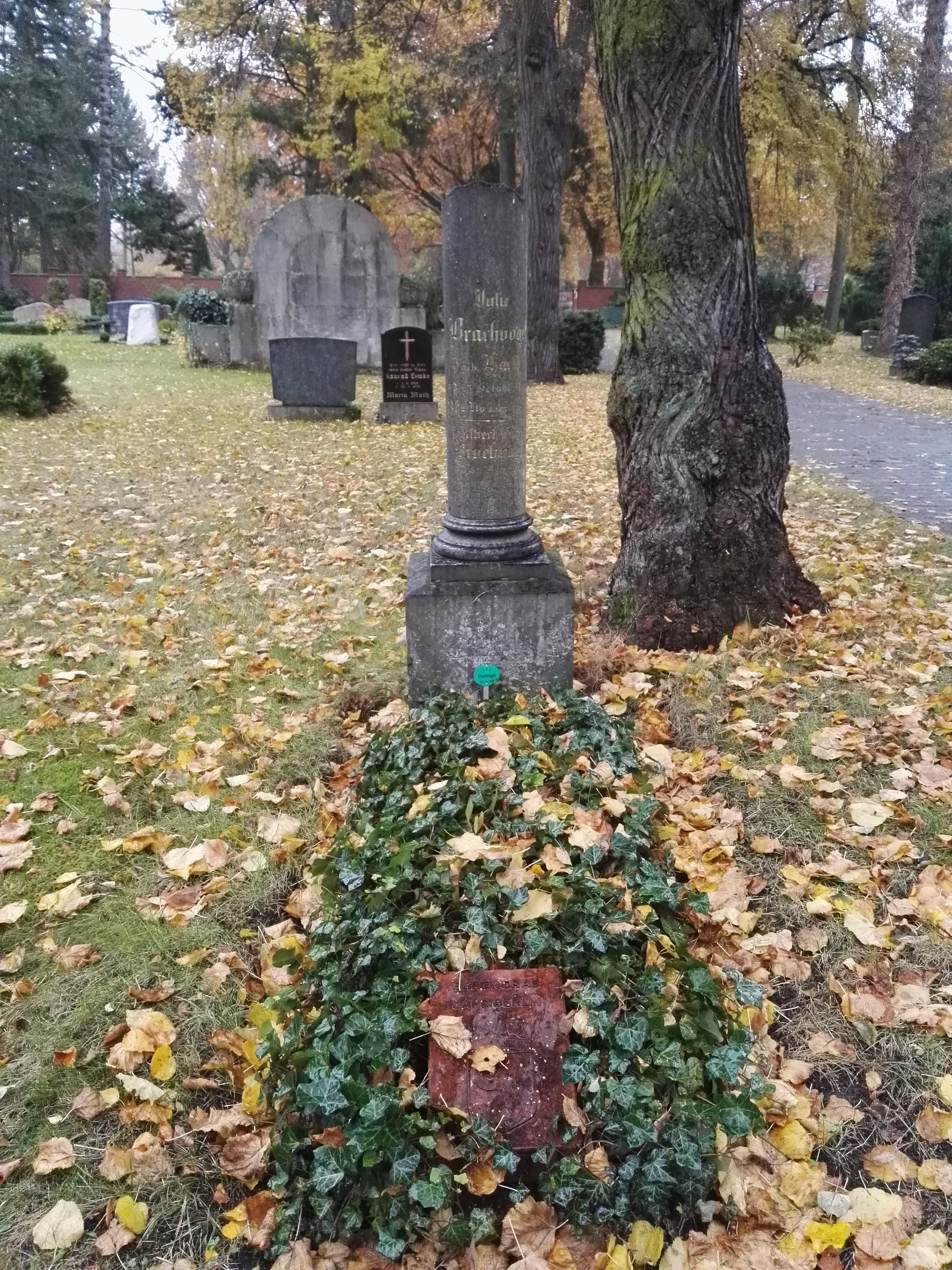 Grab von Albert Emil Brachvogel auf dem Dom-Friedhof II in Berlin-Mitte; Ehrengrab der Stadt Berlin